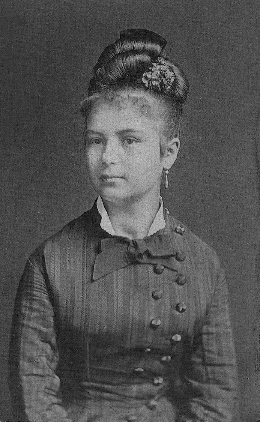 Wein Margit, Ábrányi Emilné operaénekes